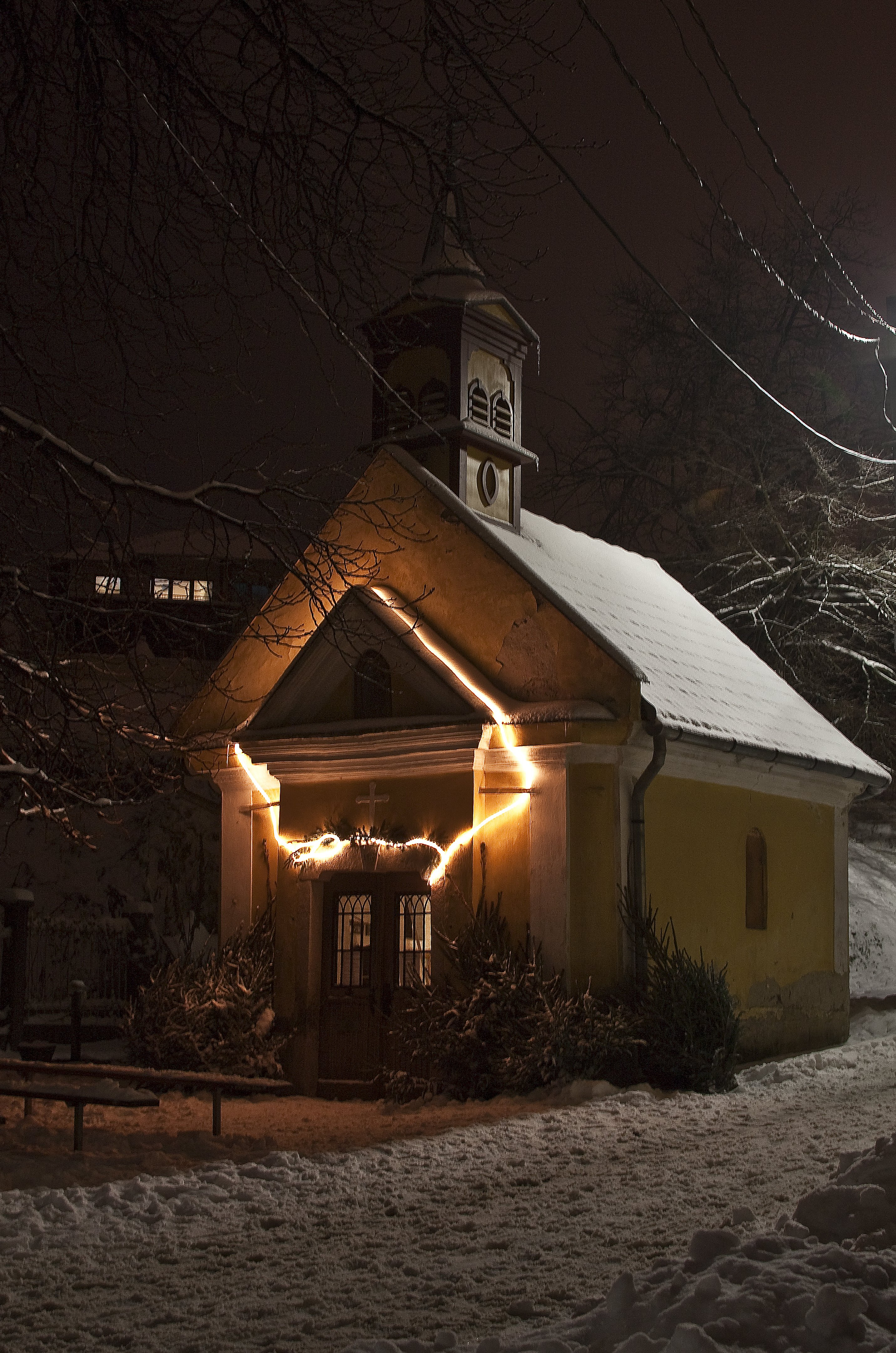 A Szent János-kúti kápolna